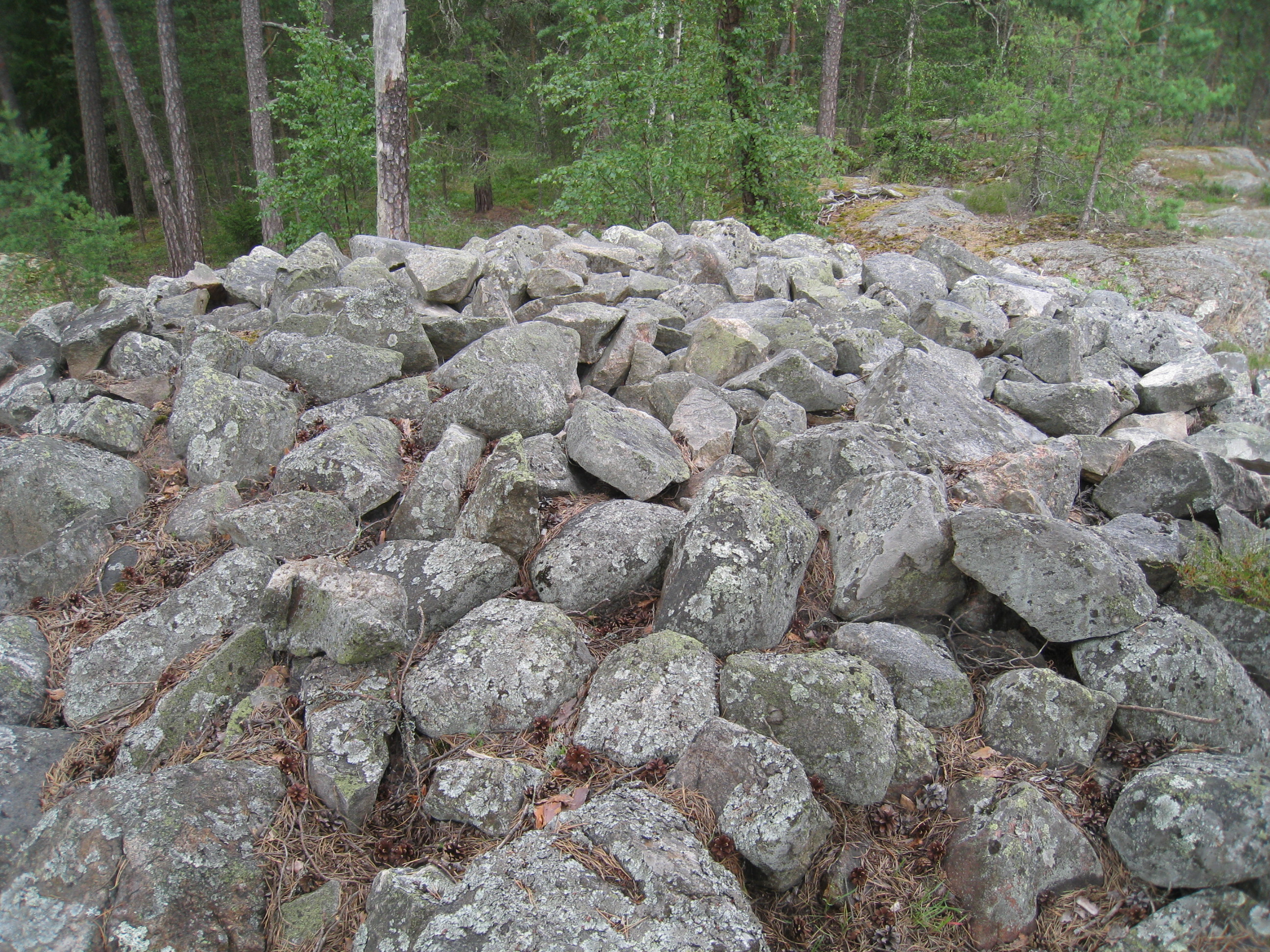 Bronsåldersröse i Ålstensskogen inom Smedslättens område i Bromma väster om Stockholm. Röset är beläget på ett krön av moränbunden bergrygg i Ålstensskogen nordväst om Solviksbadet. Röset, som är 8 meter i diameter och 0,6 meter högt, ligger inom stadsdelen Smedslätten och kan dateras till yngre bronsålder.